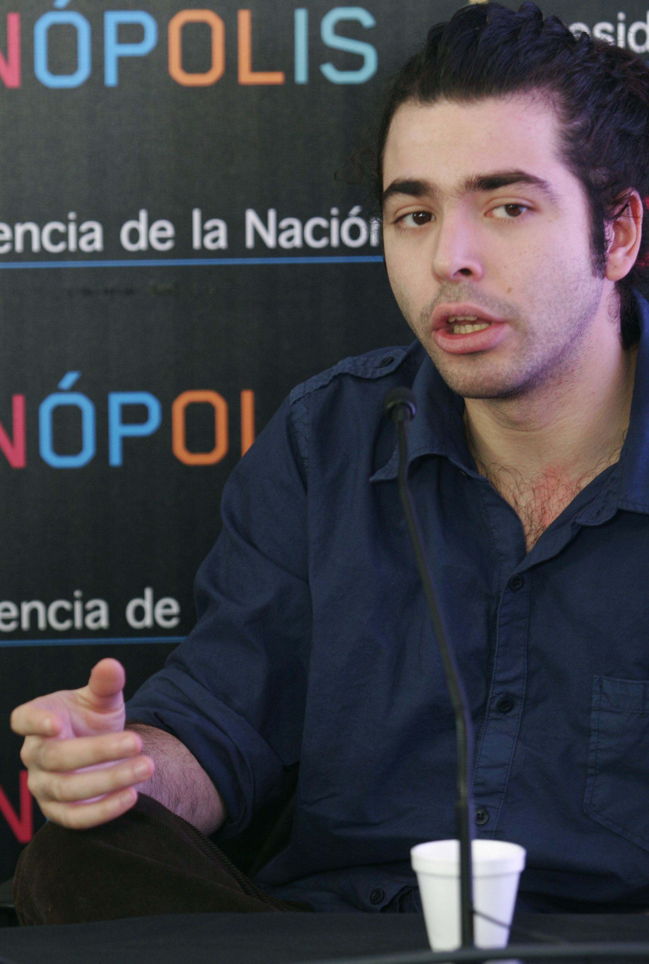 06 de Agosto de 2011. Charla "Actores 2.0" moderada por Eduarfo Frabegat con Nazareno Casero y Violeta Urtizberea. Fotos: Laura Szenkierman/Tecnópolis.